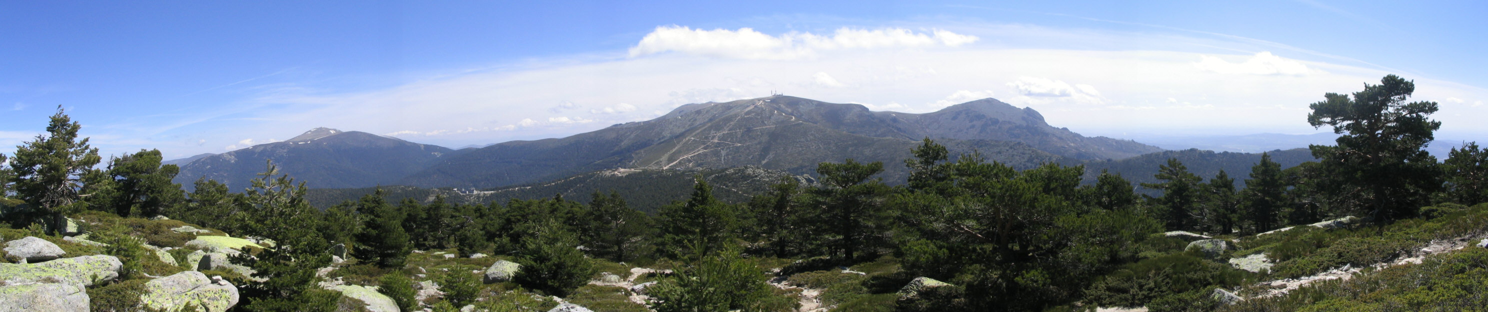 De izquierda a derecha se aprecia el pico de Peñalara (2.430 m), el puerto de Cotos (1.830 m), la Bola del Mundo (2.268 m) y La Maliciosa (2.227 m). Imagen tomada cerca de la cima de Siete Picos.